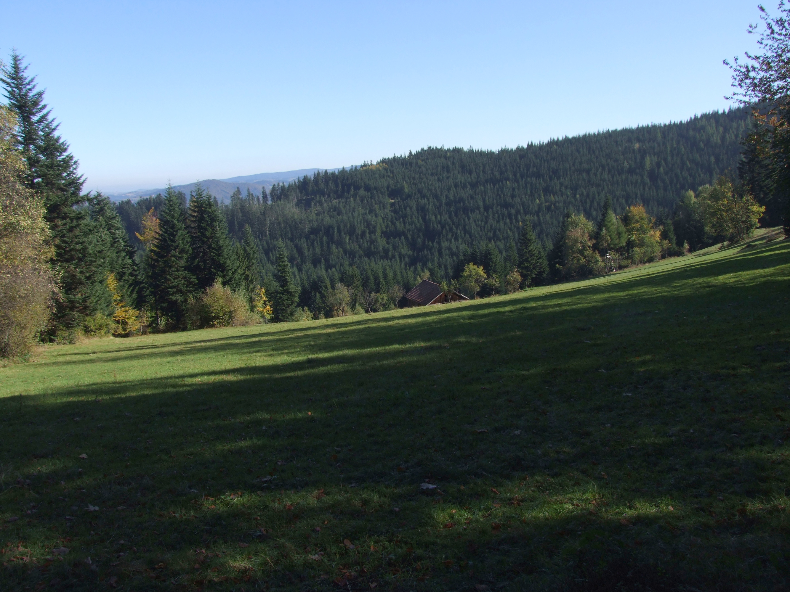 Polana Wilcze Doły w Paśmie Jaworzyny Beskidu Sądeckiego